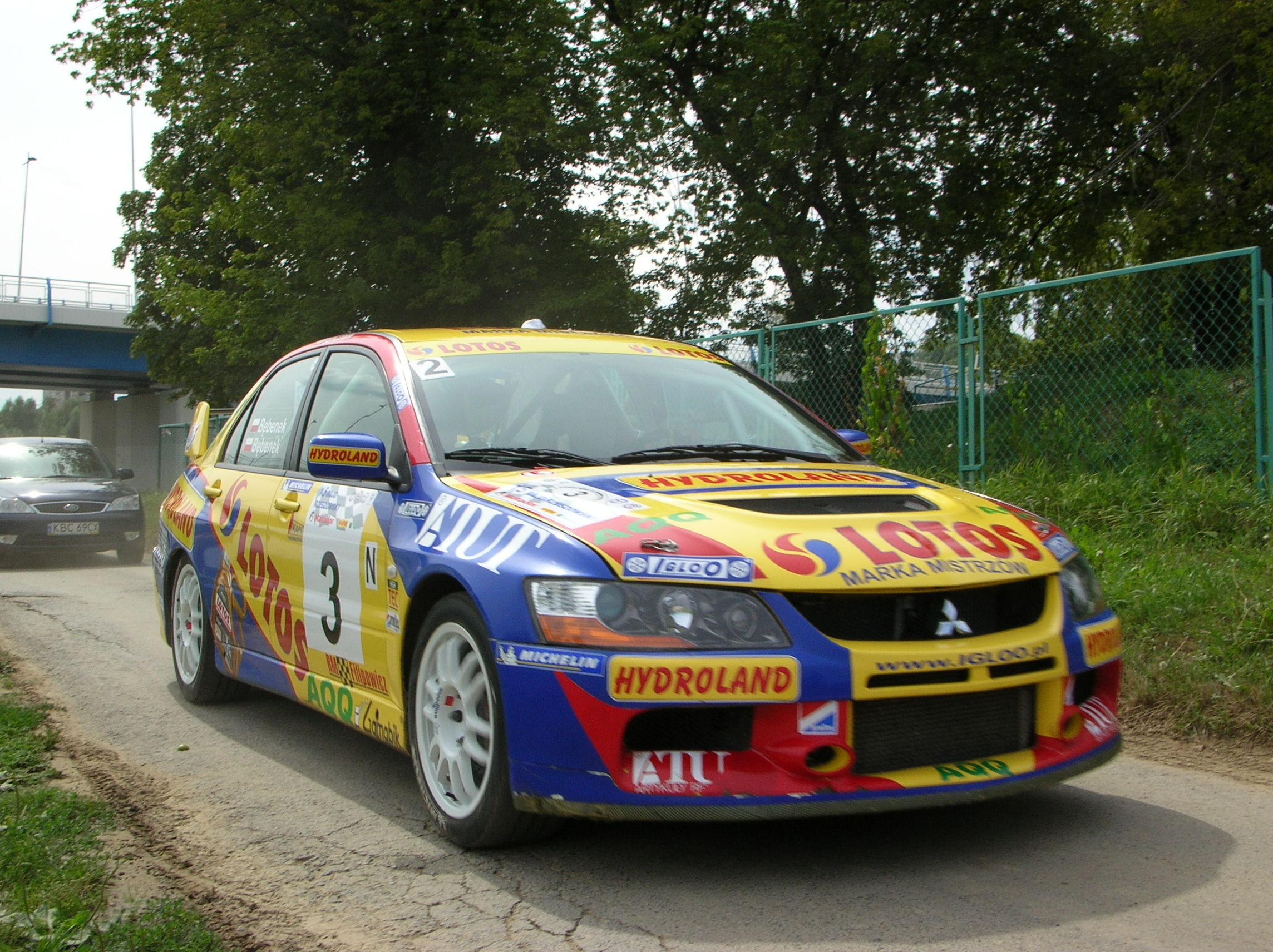 Mitsubishi LANCER Evo IX MichałBębenek 15. Rajd Rzeszowski